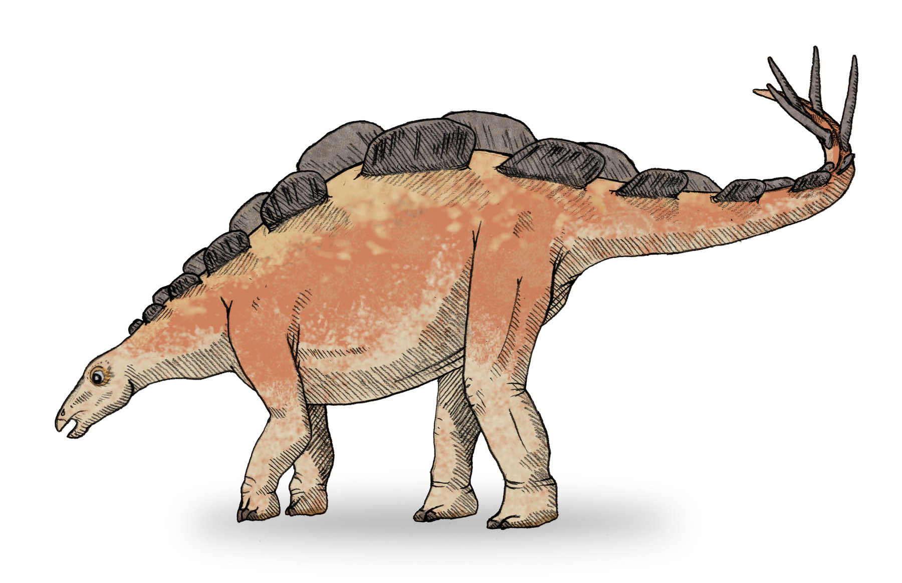 by me user debivort, 1.07